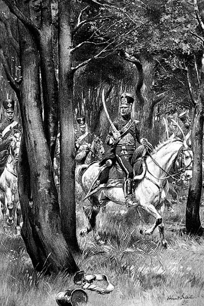 Reconnaissance sous bois, 1809. Chasseurs à cheval de la ligne français, officier en tête.